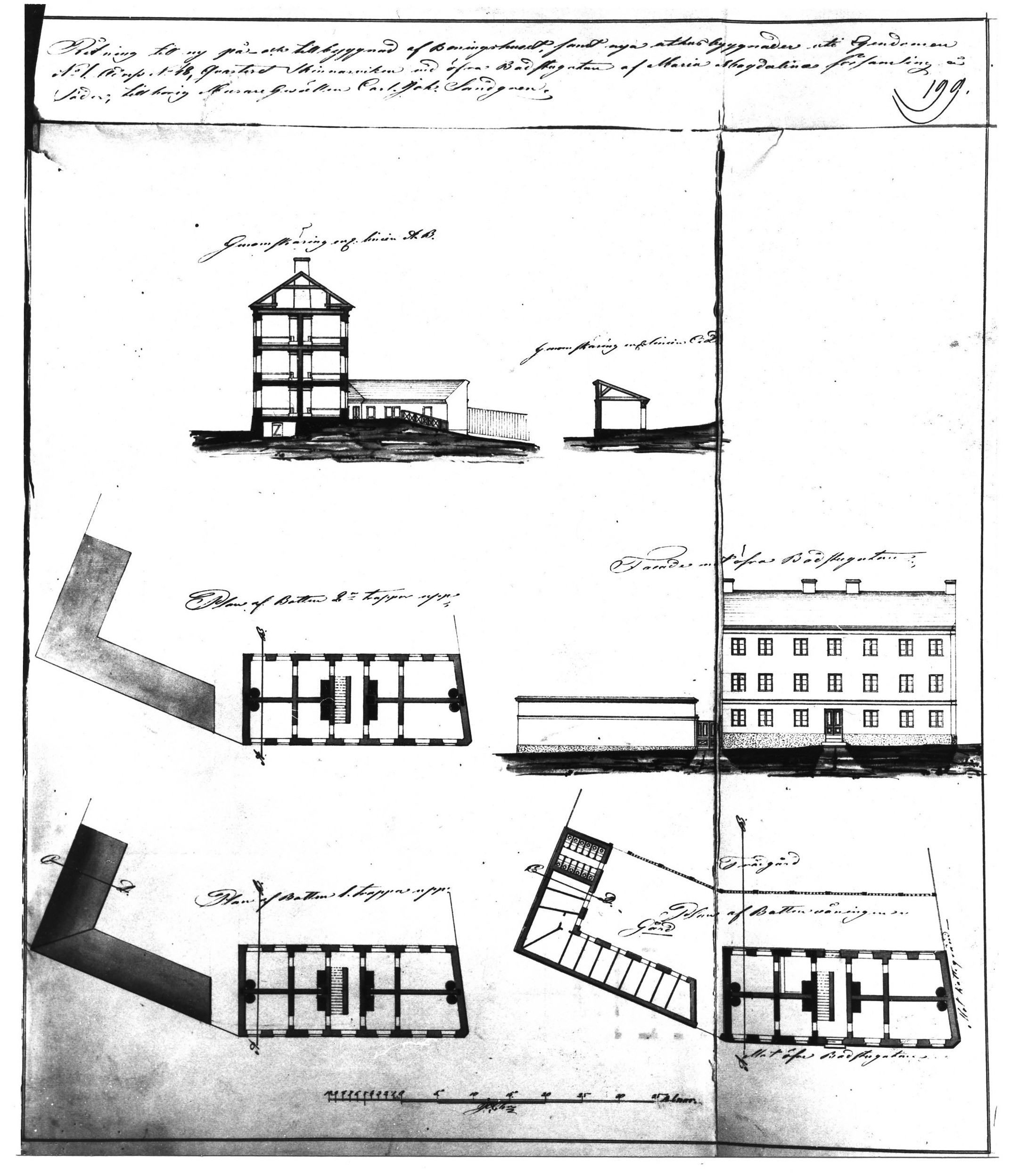 Ritning för fastigheten Skinnarviken 1, Bastugatan 48